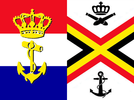 Flag ABNL